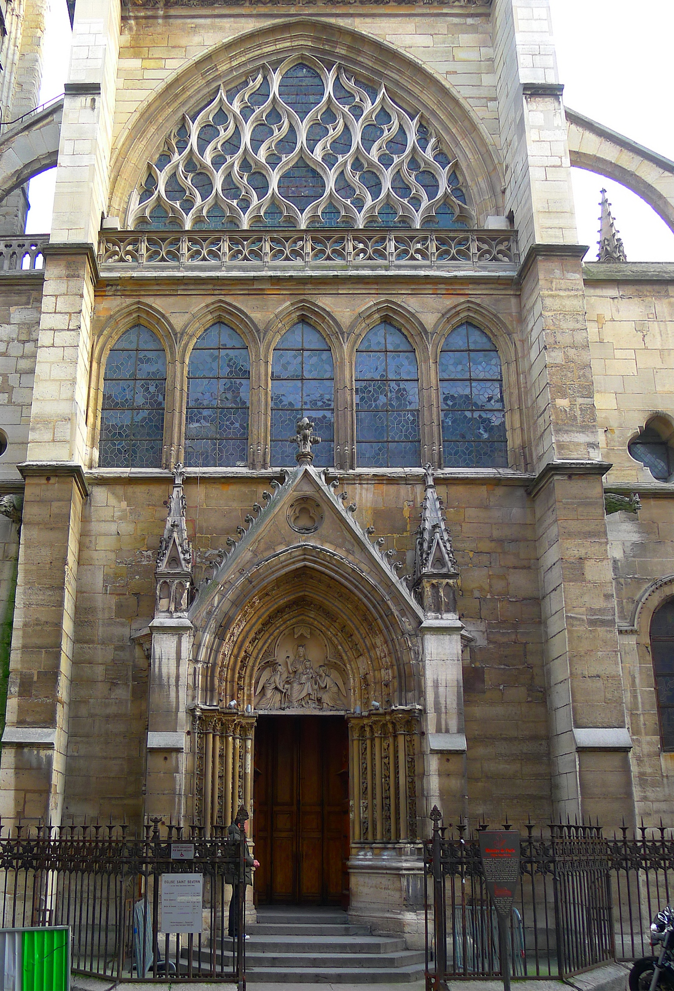 Église Saint-Séverin (portail) - Paris V .